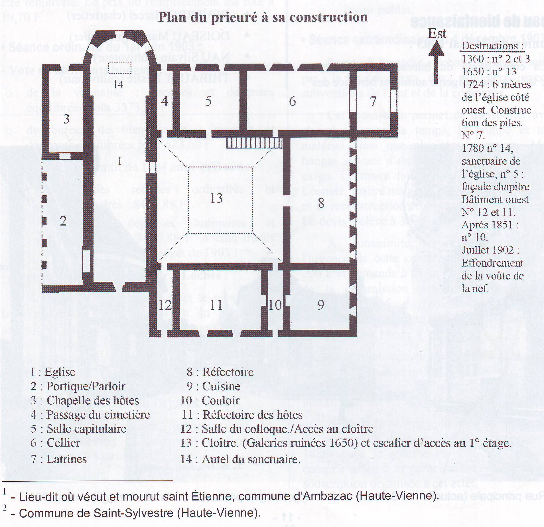 Plan du Prieuré de Grammont-Villiers situé sur la commune de Villeloin-Coulangé en Indre-et-Loire